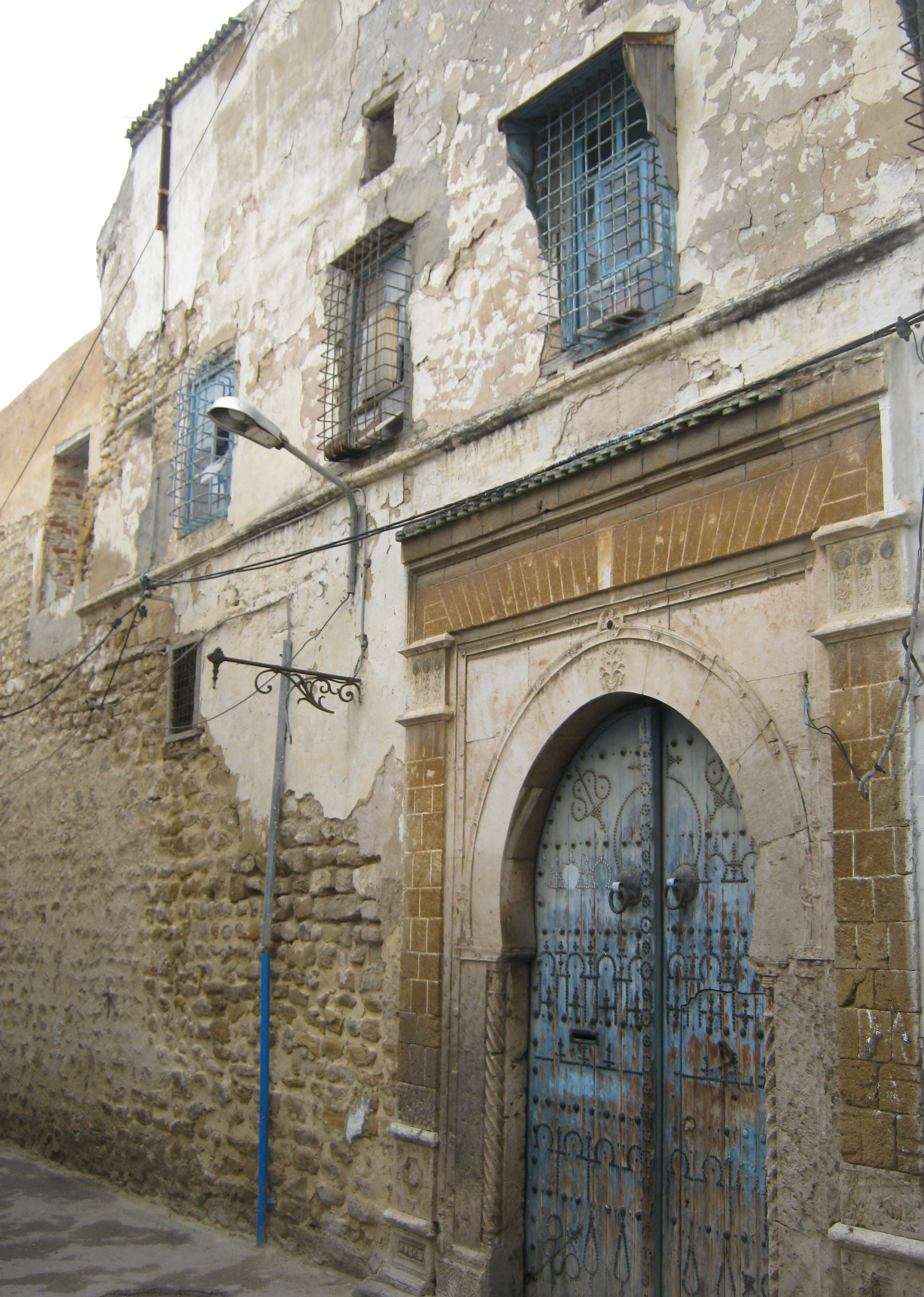 Palais Ibn abi Dhief à Beb soukika